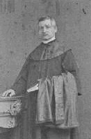 Josef Mottl (1827-1884), římskokatolický farář a děkan